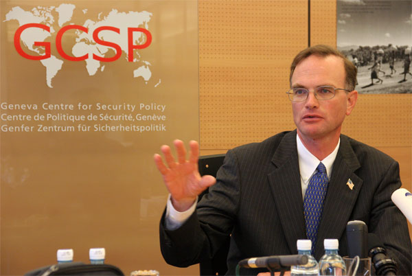 Gregory Schulte